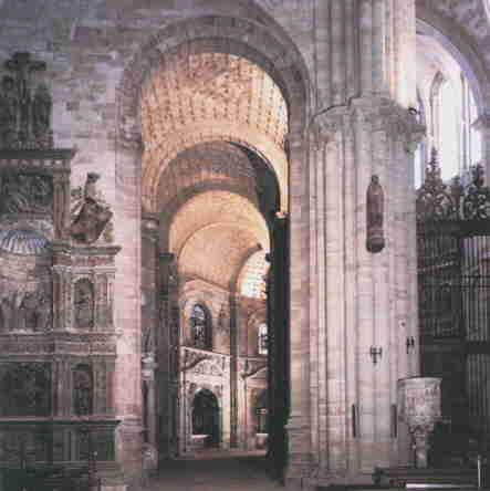 Girola